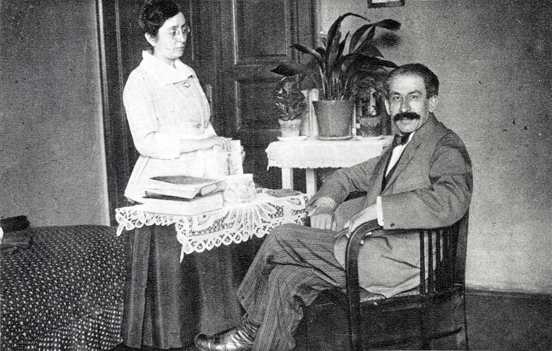 Buchinger Manó és felesége, Buchingerné Ladányi Szeréna középiskolai tanárnő